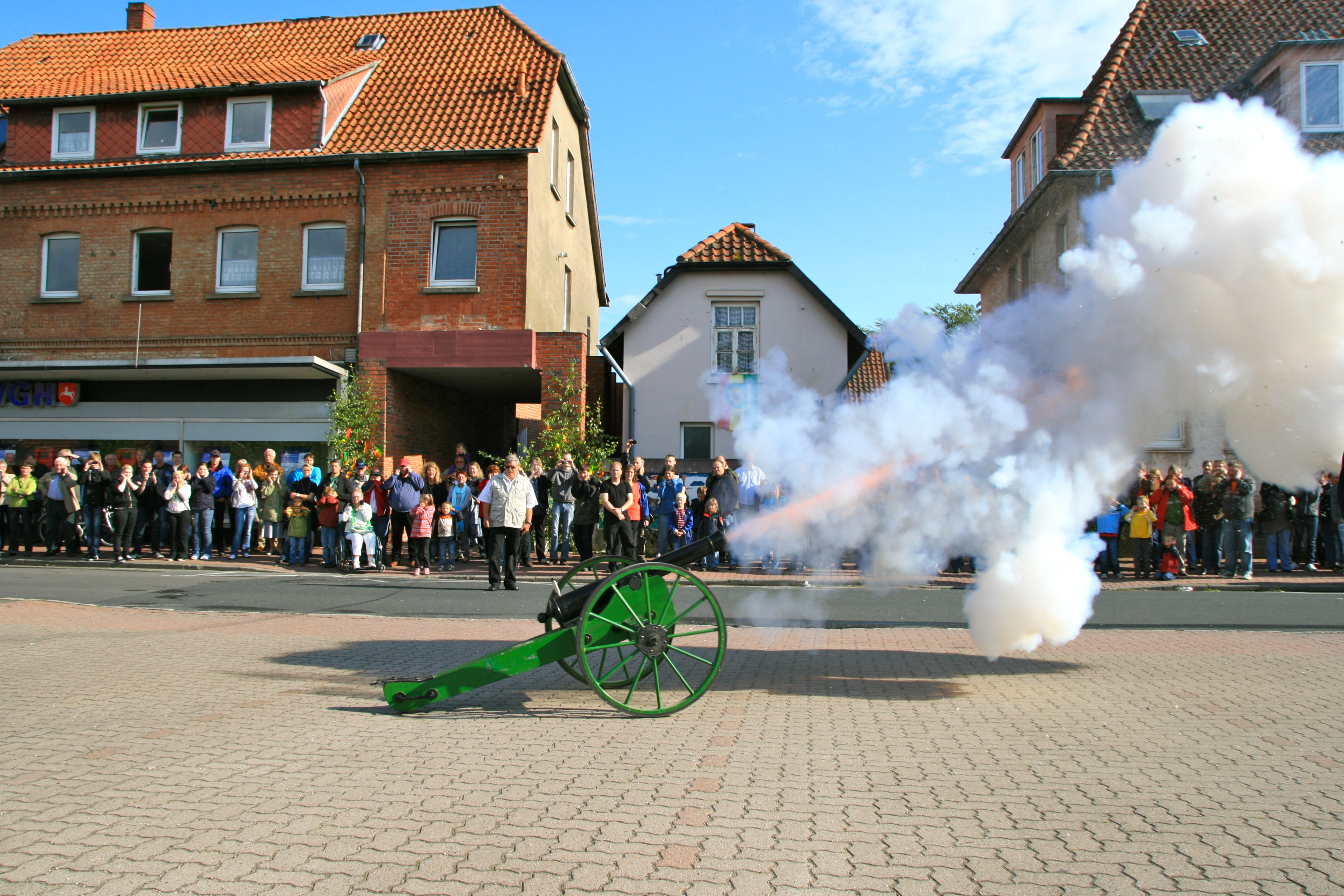 Kanone Historisches Freischießen Wennigsen